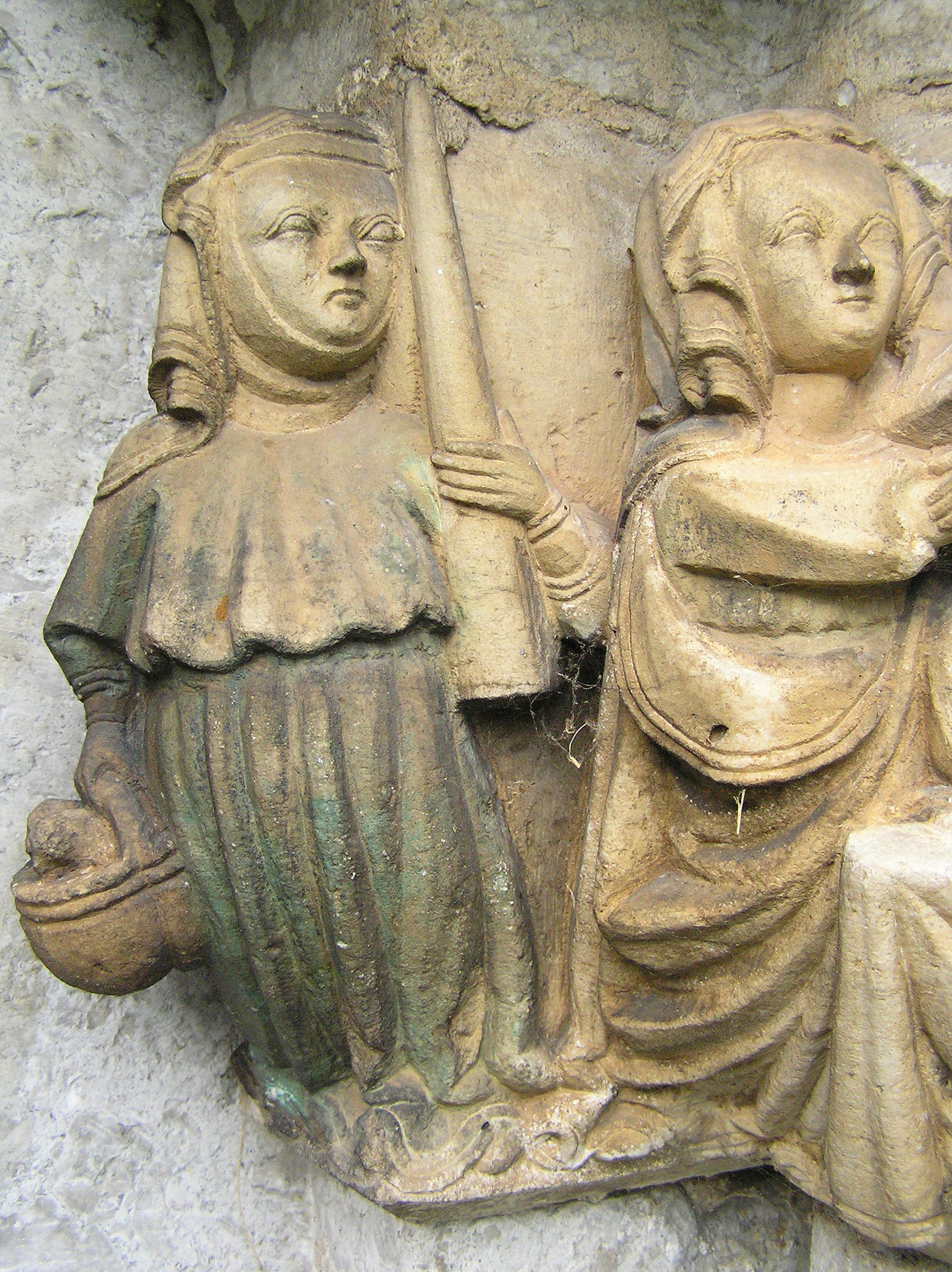 Martebo kyrka, detalj av kapitälband som visar Jesu frambärande i templet. Tjänarinnan längst till vänster, bakom Maria, bär en korg med offerduvor och ett stort vaxljus. Kapitälbandet har varit målat, vilket syns tydligt på hennes mörkt gröna klänning. Reliefen har tillskrivits olika stenmästare/hyttor, "Fabulator" enligt Johnny Roosval, "Martebo-mästaren" enligt Erik Lundberg och "Egypticus" enligt Erland Lagerlöf.